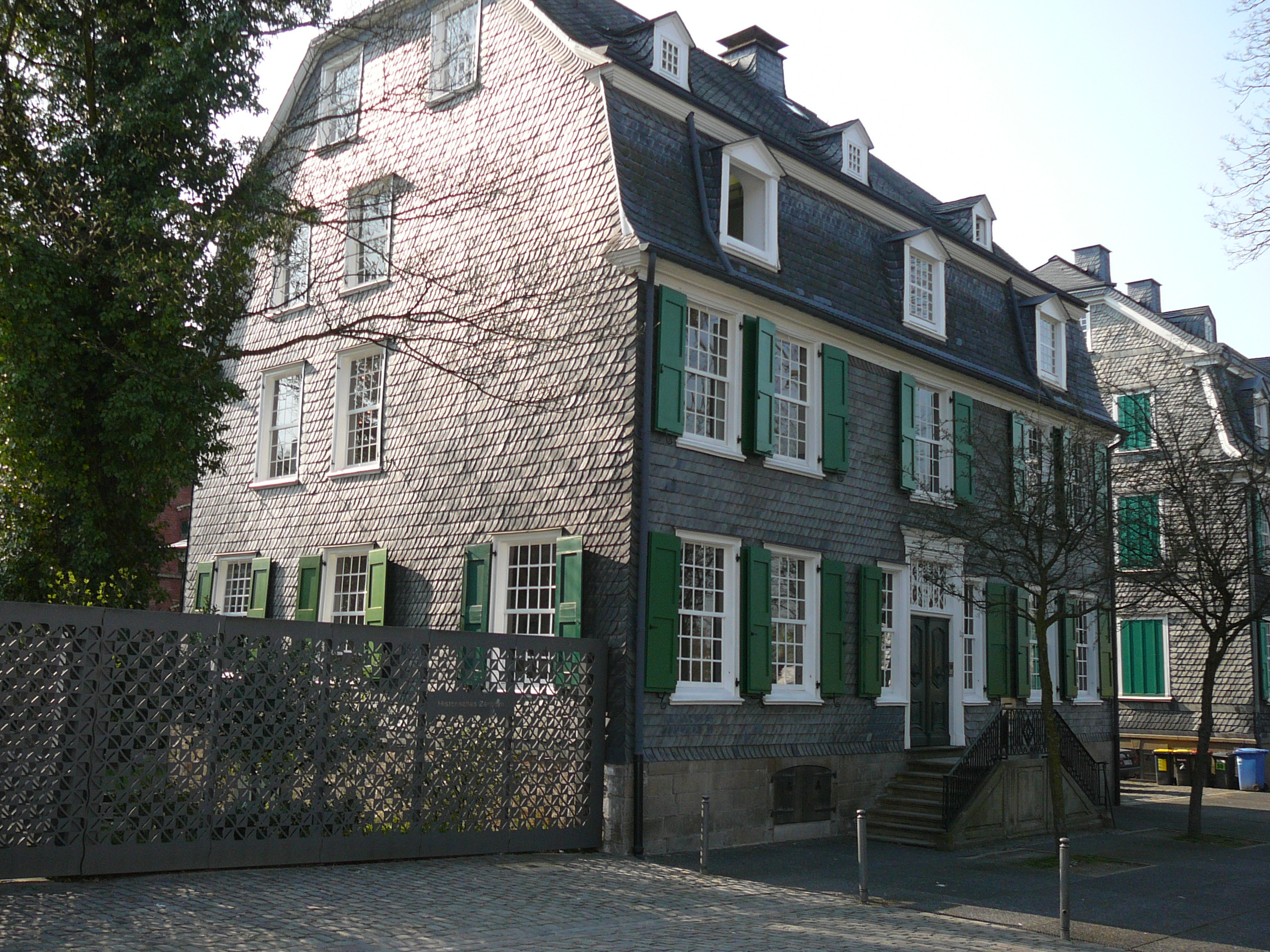 Engelsstraße, Wuppertal